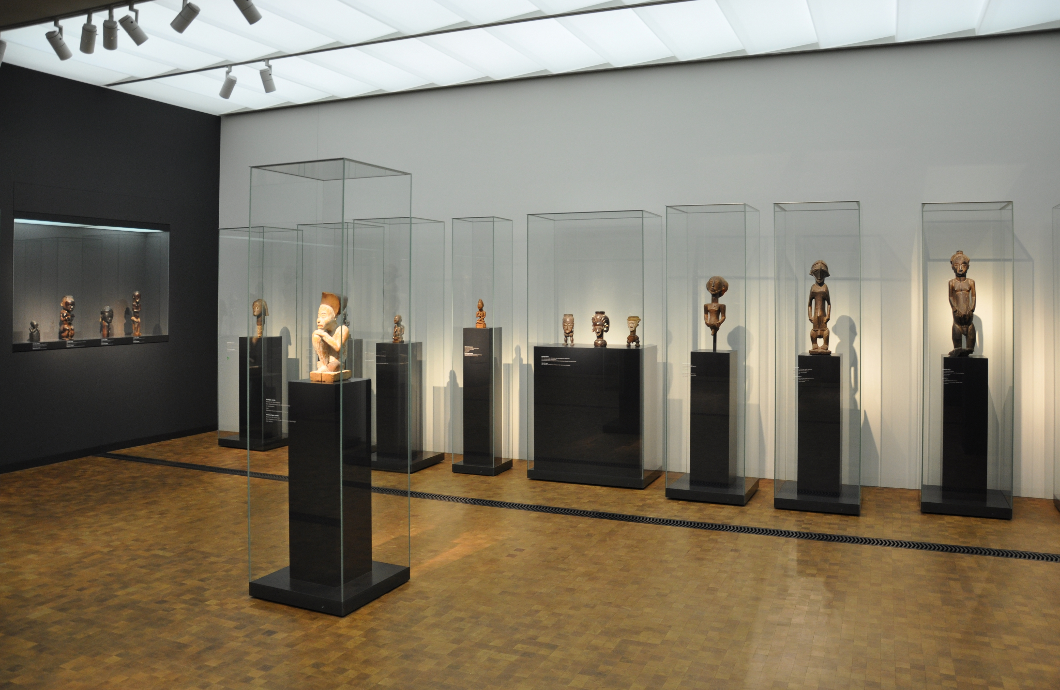 In der Afrikaatbeilung des Museums Rietberg, Zürich (Erweiterungsbau Smaragd)